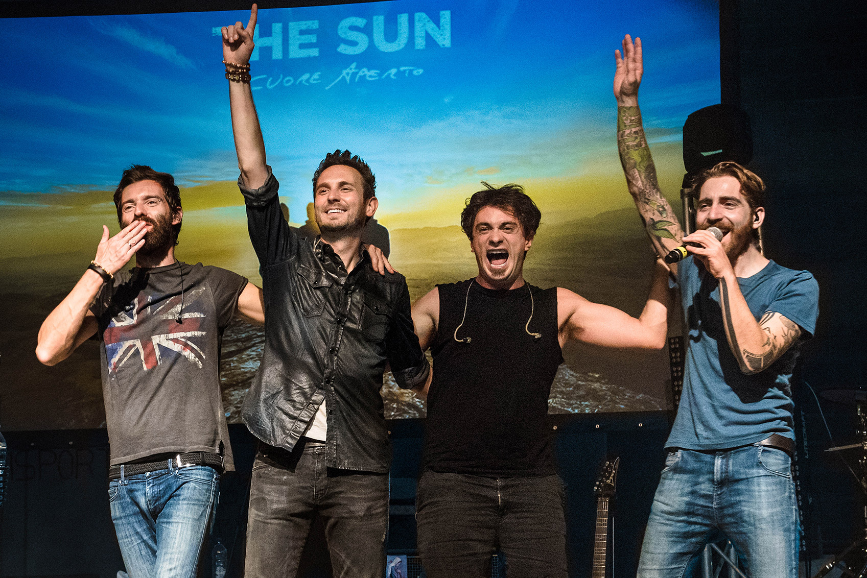 Performance live dei The Sun @ Bresseo di Teolo (PD)